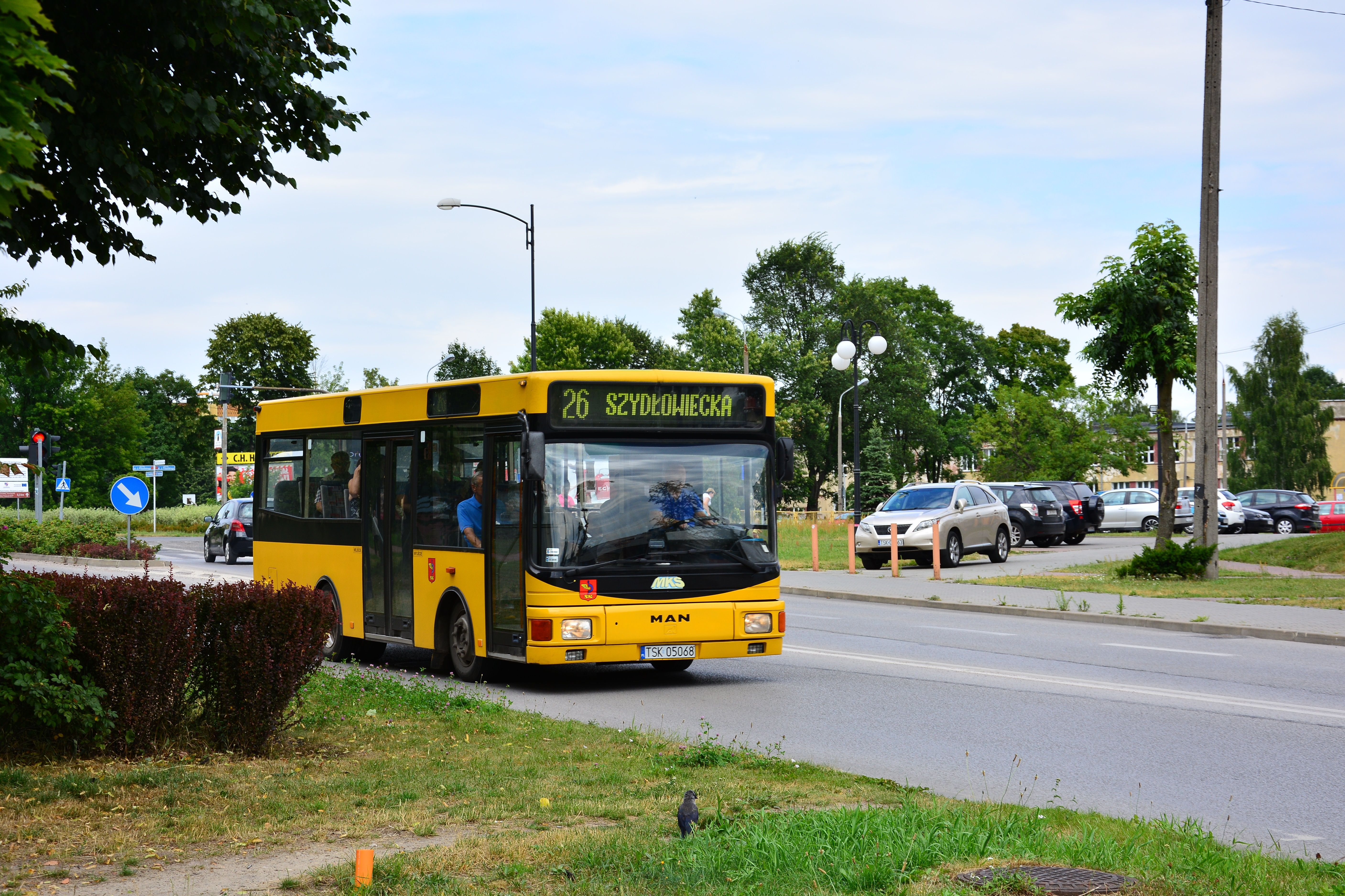 MAN NM 152 #425 należący do Miejskiej Komunikacji Samochodowej na linii nr 26 w kierunku ul. Szydłowieckiej, na ulicy Krasińskiego w Skarżysku-Kamiennej.